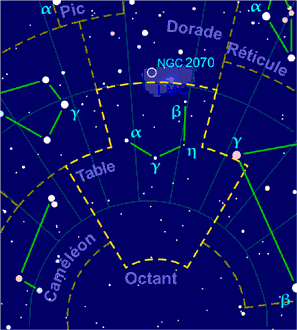 Carte pour la constellation Table Produite à l'aide du logiciel PP3